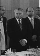 Berlin, Militärakademie- Absolventen, Empfang ADN-ZB Mittelstädt 6.9.85 Berlin: Empfang Militärakademien-Der Generalsekretär des ZK der SED, Erich Honecker, Vorsitzender des Staatsrates und des Nationalen Verteidigungsrates der DDR, sprach einen Toast während des Empfangs für die diesjährigen Absolventen von Militärakademien. Daran nahmen teil v.l.: Kurt Hager, Willi Stoph, Armeegeneral Heinz Hoffmann, Armeegeneral Erich Mielke, Wjatscheslaw Kotschemassow, Wolfgang Herger.